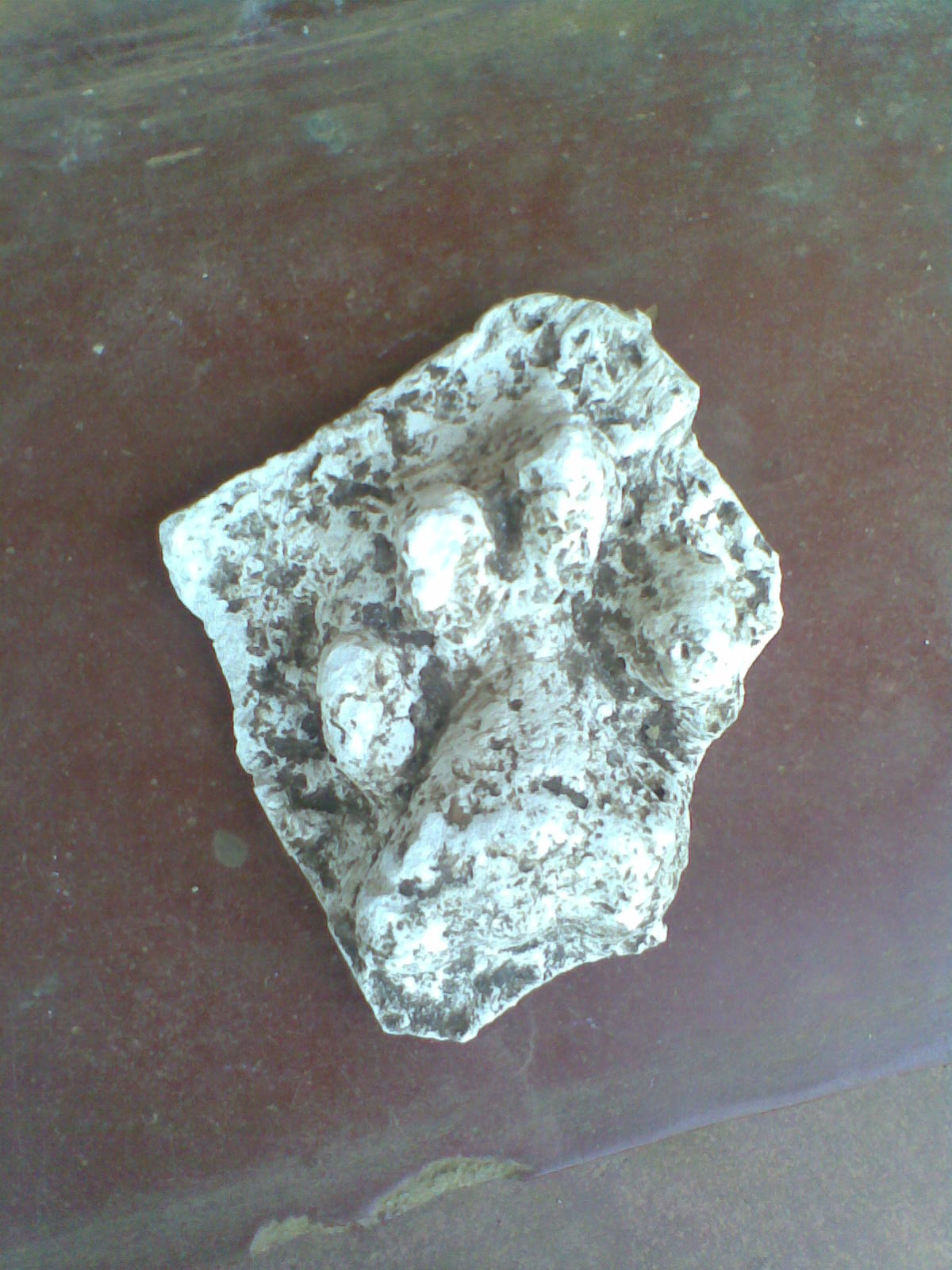 പെരിയാർ കടുവാ സം‌രക്ഷണപ്രദേശത്തുനിന്നും കണ്ട കടുവയുടെ കാൽപ്പാടിന്റെ മോൾഡ്.